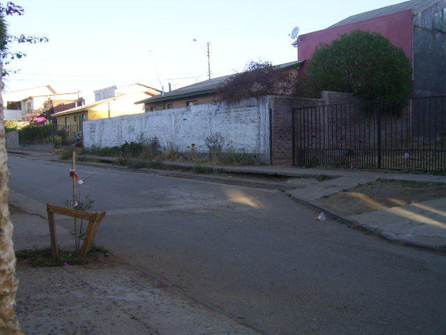 Calle Sebastián Elcano, en la Villa Los Navegantes, Pichilemu.